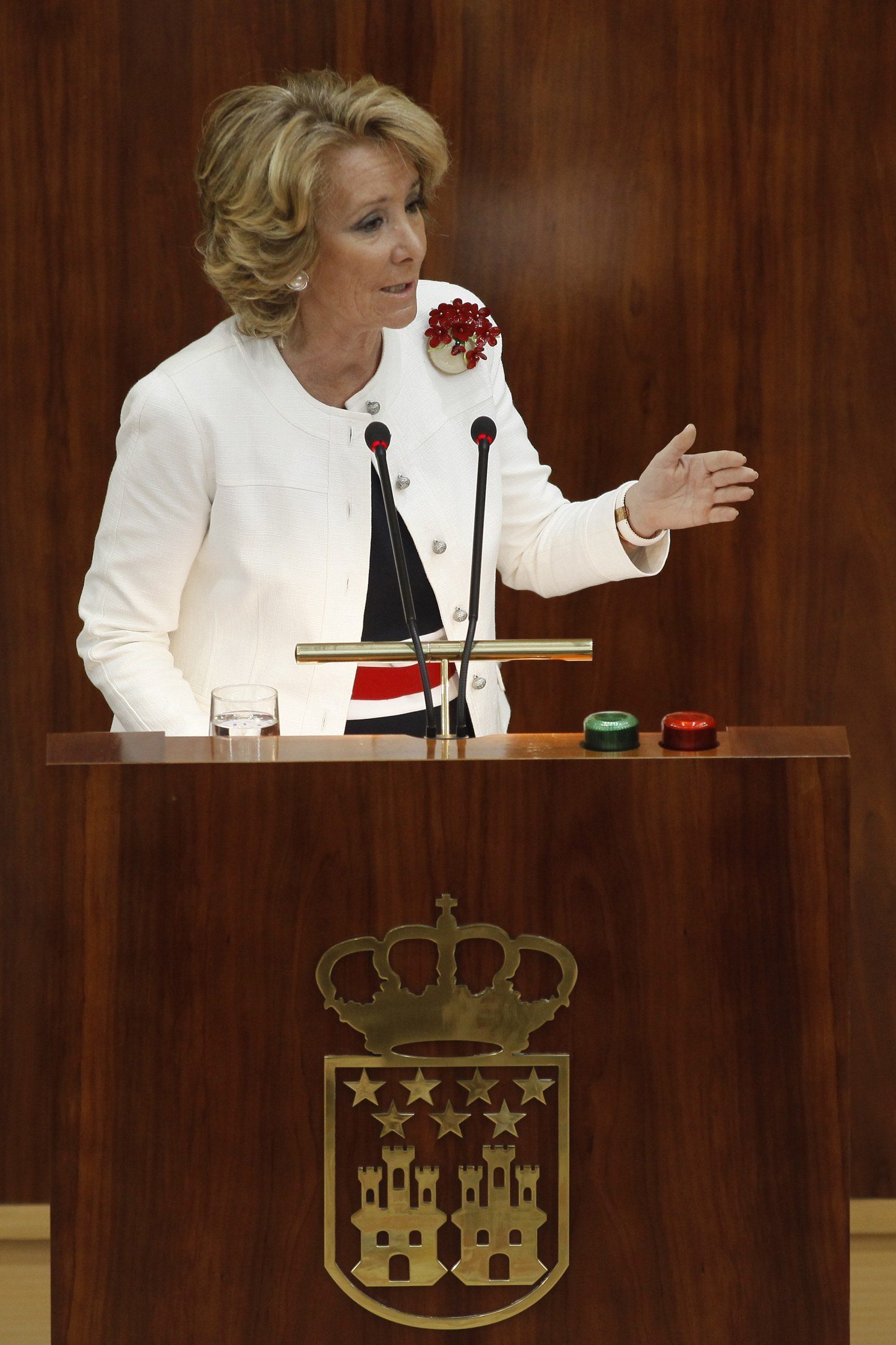 Segunda sesión del debate de investidura de Esperanza Aguirre